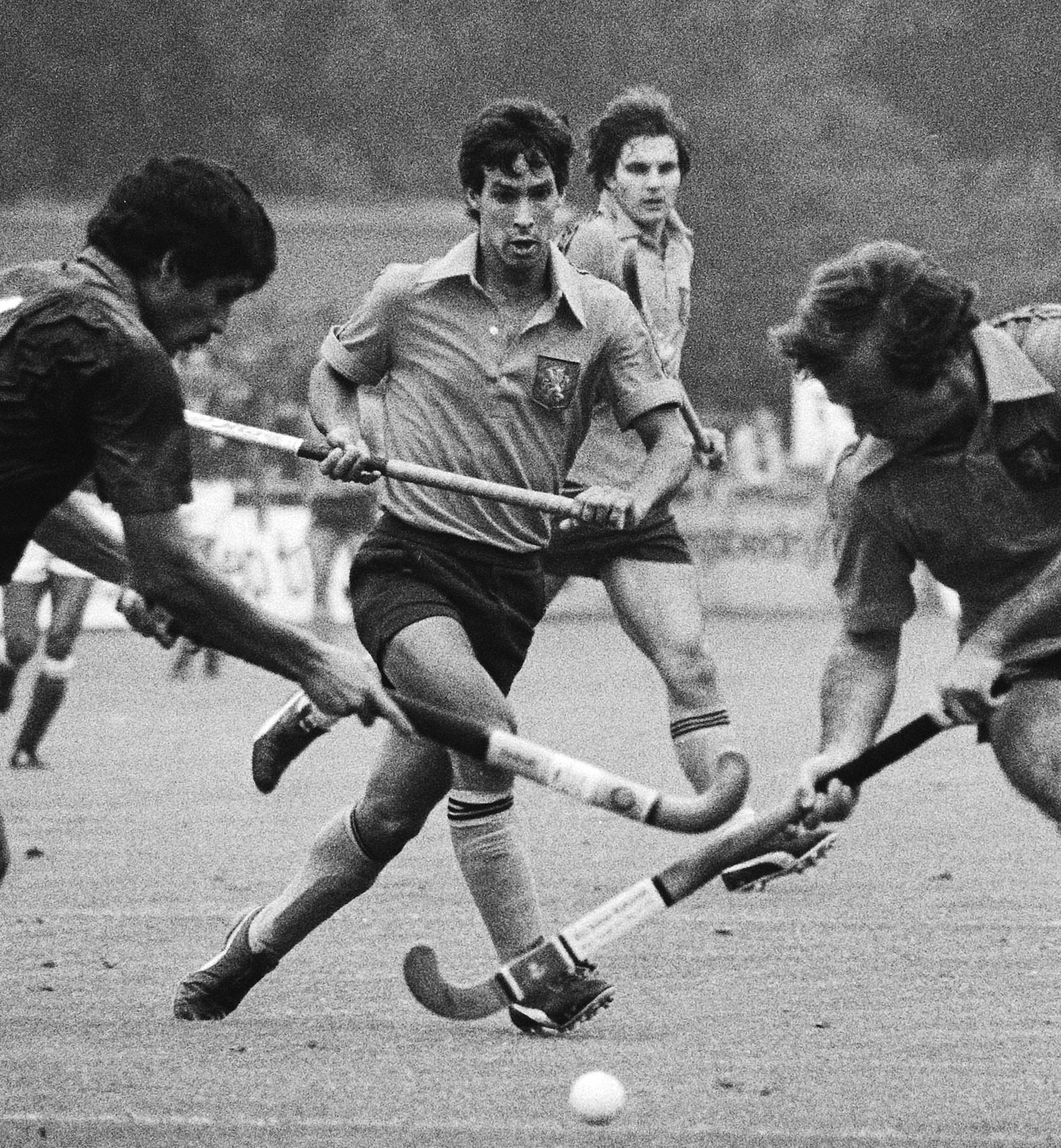 Theodoor Doyer (r) in duel, op de achtergrond Ties Kruize en Wouter Leefers.